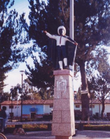 Danza Costumbrista Los Negritos Decentes del Distrito Nueve de Julio